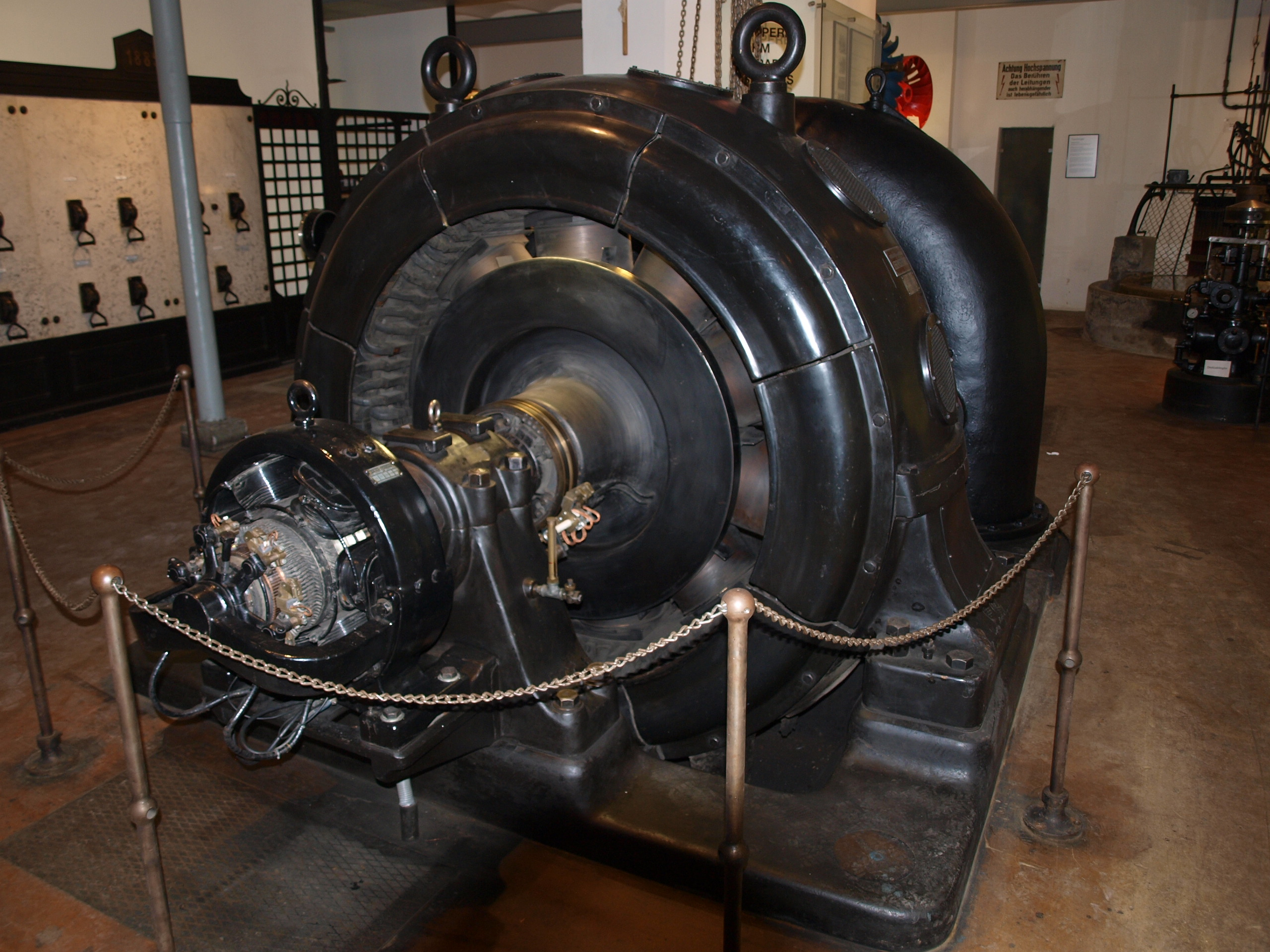 Francis Turbine mit Generator. 600 U/min bei 26m Fallhoehe und einem Durchfluss von 1600 Liter/sek. Generatorleistung 320 kW bei 3x500VAC. Erregermaschine 4,8 kW (Elektromuseum Frastanz).